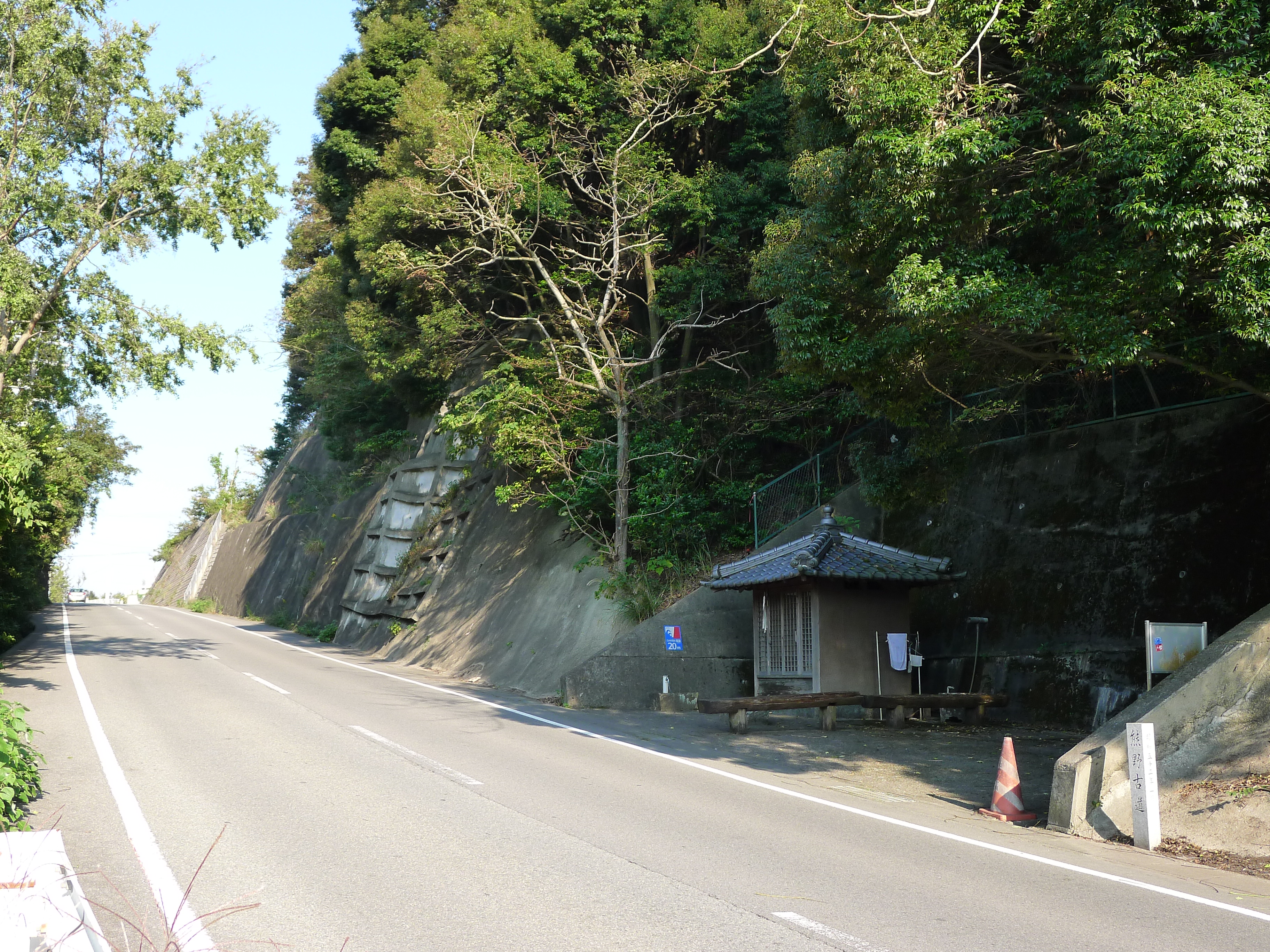 熊野古道紀伊路の汐見峠（和歌山県海南市）。道路は和歌山県道136号。道の傍らに地蔵堂が祀られている。